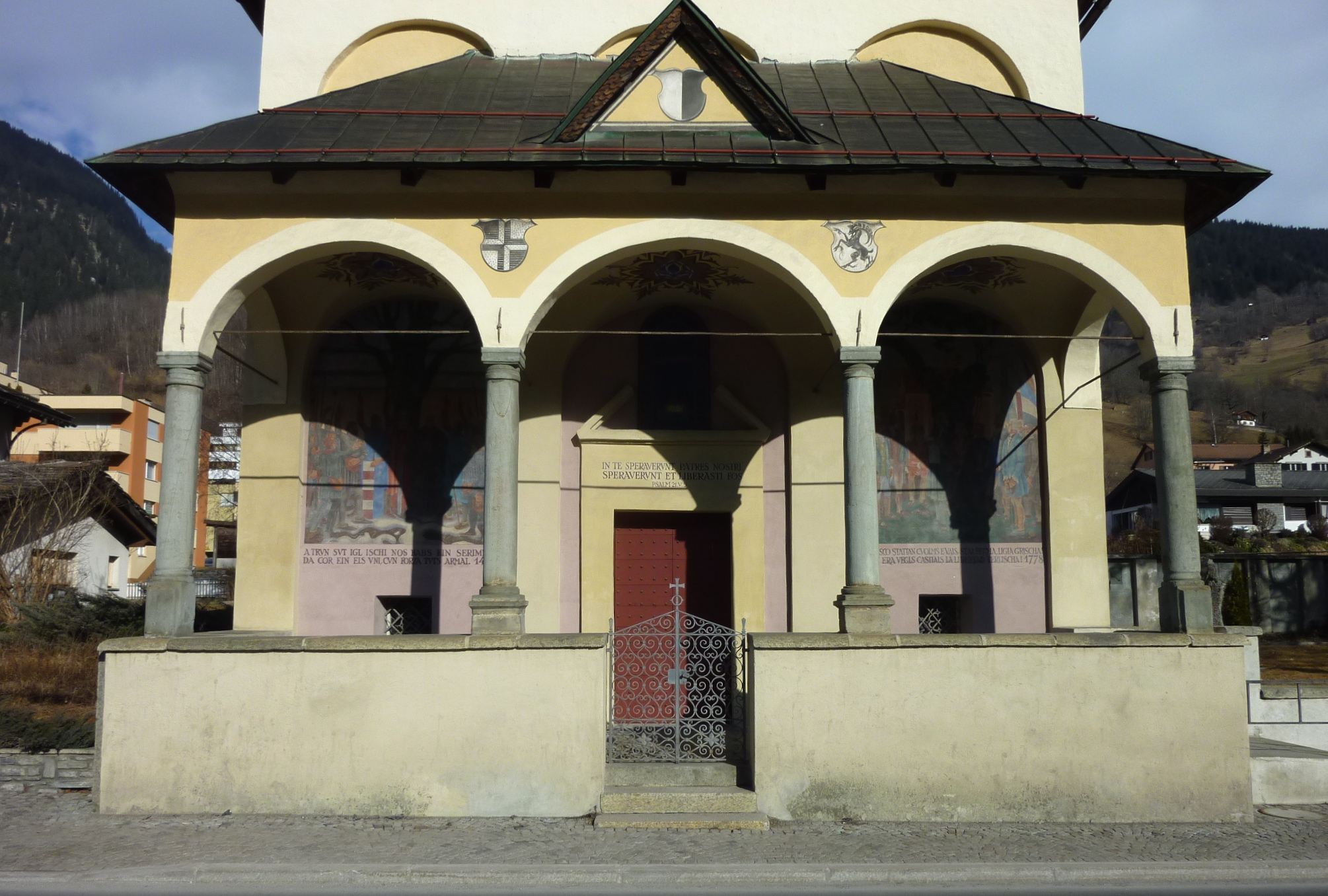 Caplutta Sontga Onna, Vorhalle